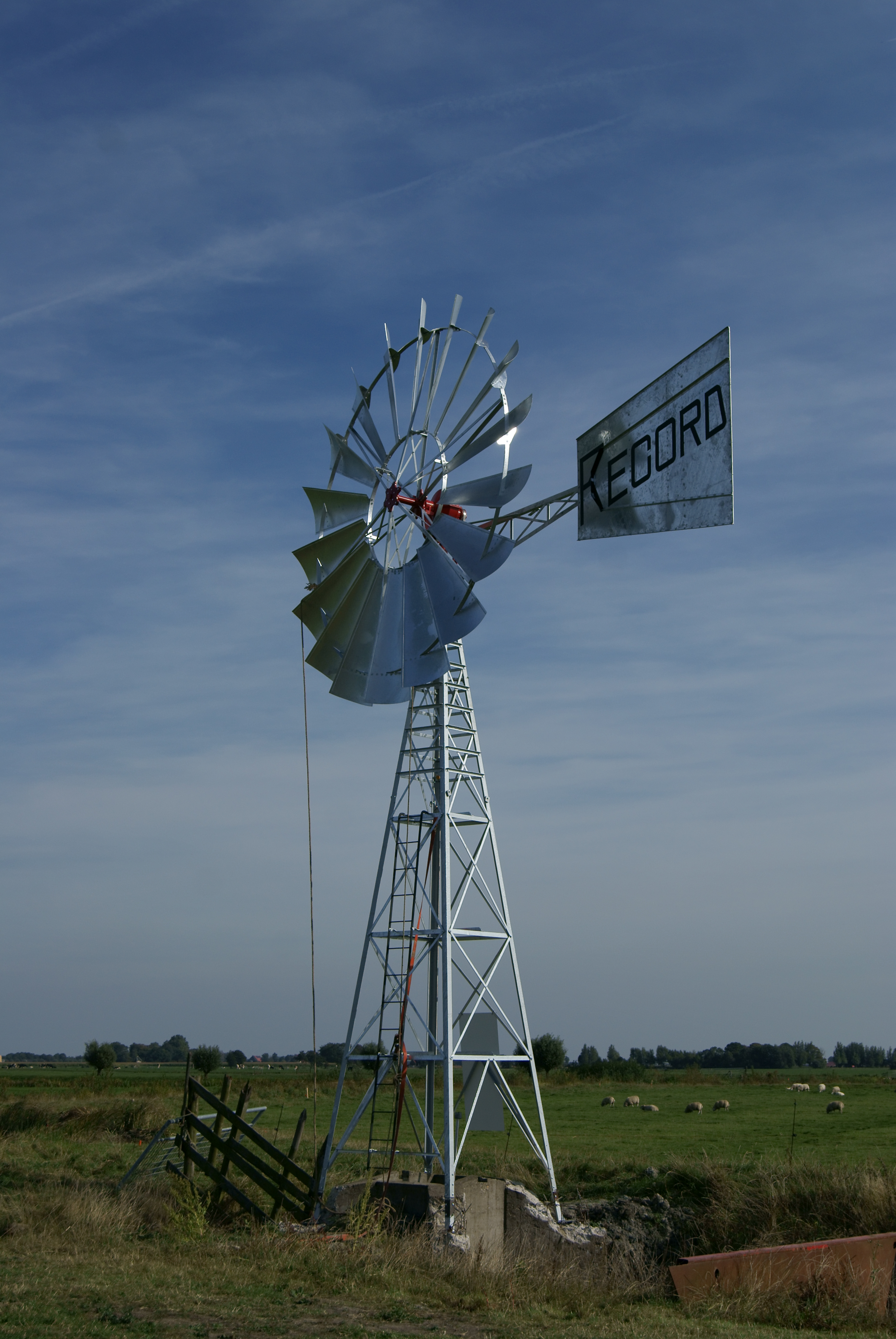 Dit is een foto van de Amerikaanse windmotor bij wirdum. Vlak na herplaatsing